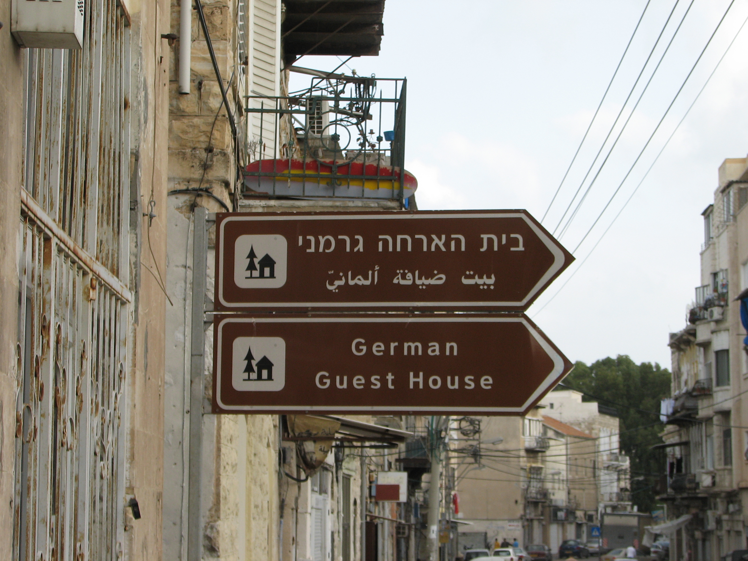 German Guest House, downtown Haifa אנשי ההוספיץ הגרמני על שם קרל בורמאוס הגיעו לחיפה בשנות ה-80 של המאה ה-19. ב-1881 הם רכשו אדמה ליד המושבה הגרמנית והקימו במקום בית הארחה נמצא בדרך יפו 105 חיפה